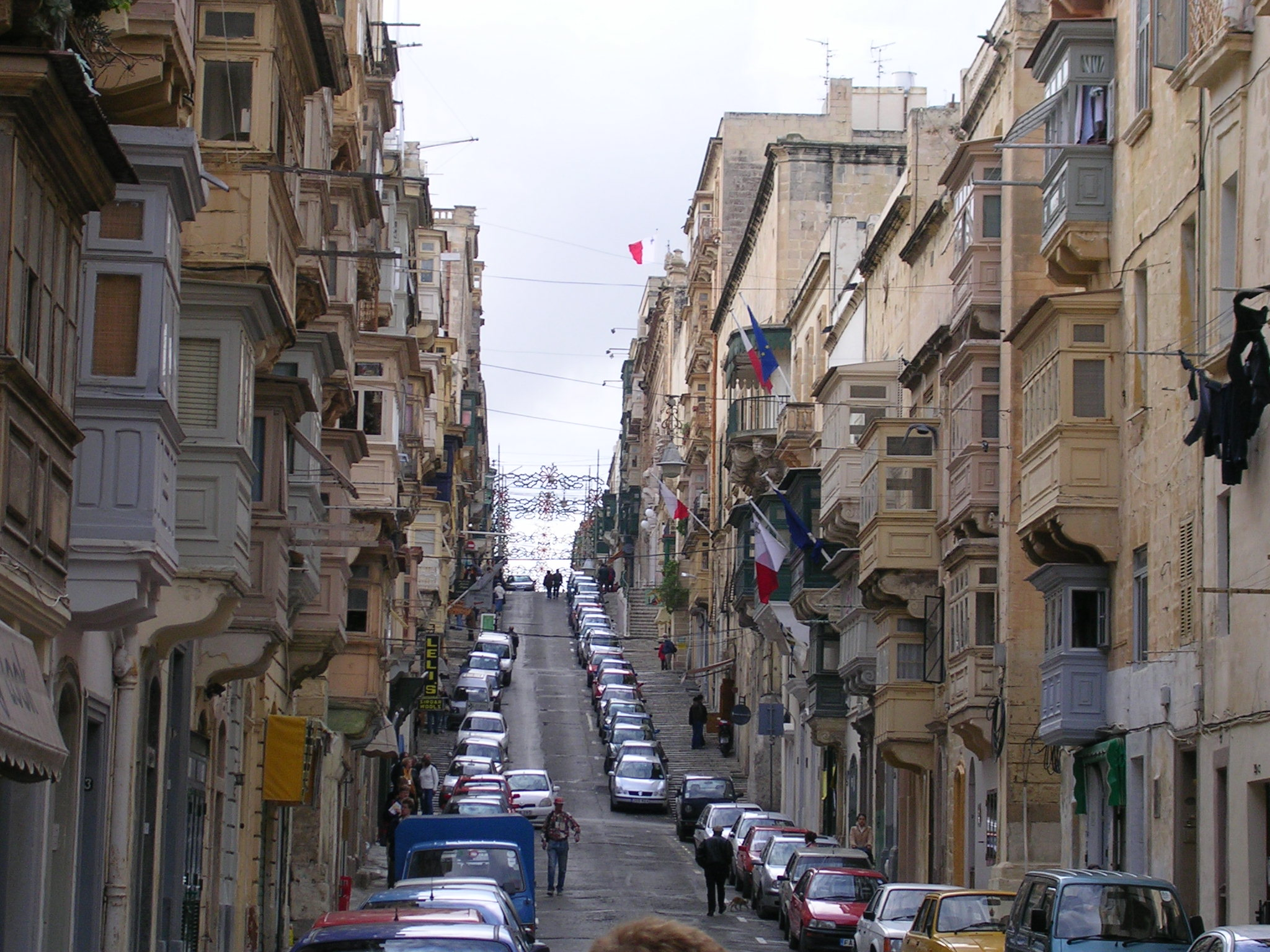 Street in Valetta. Author: Väsk Date: December 2004